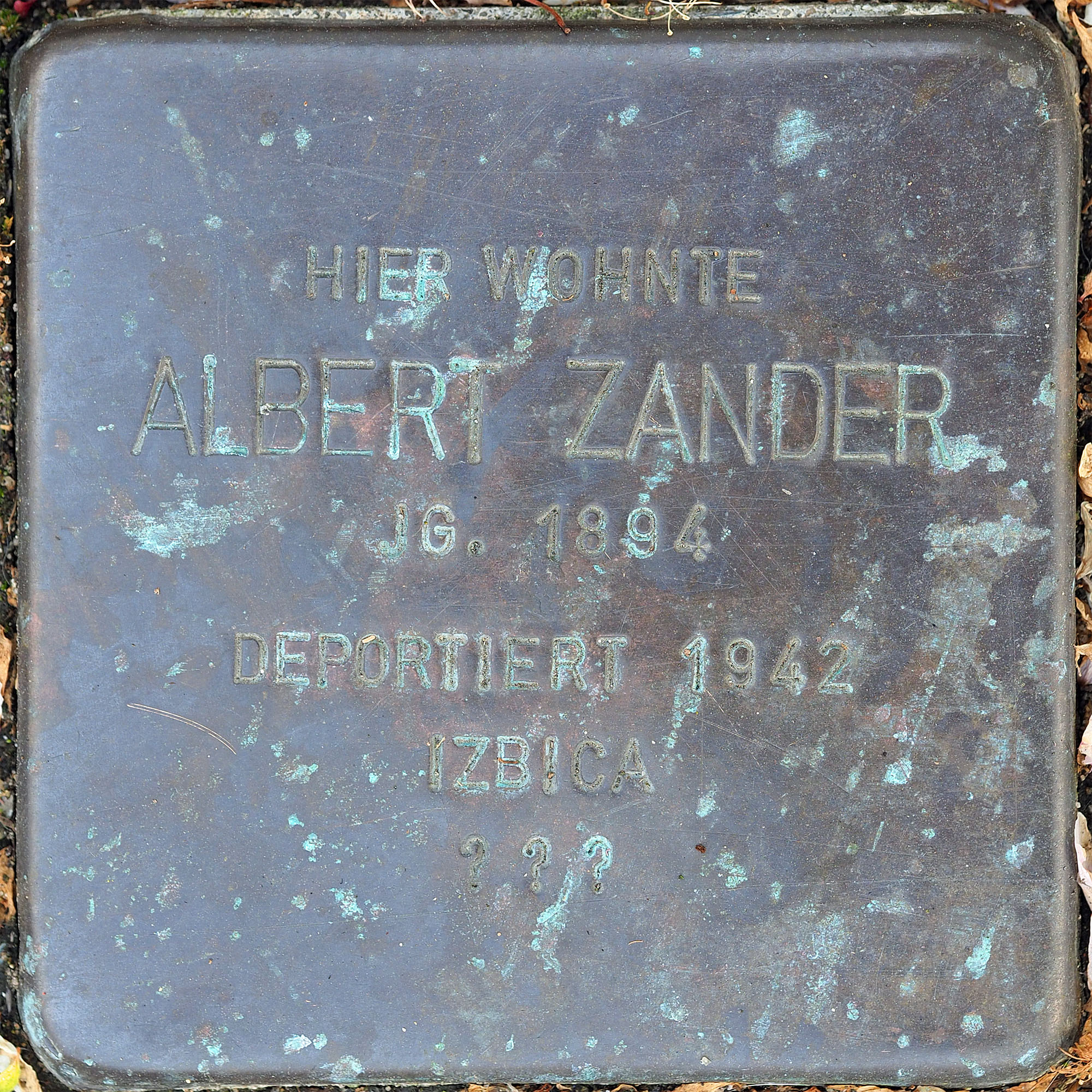 Stolpersteine MG: Zander, Albert